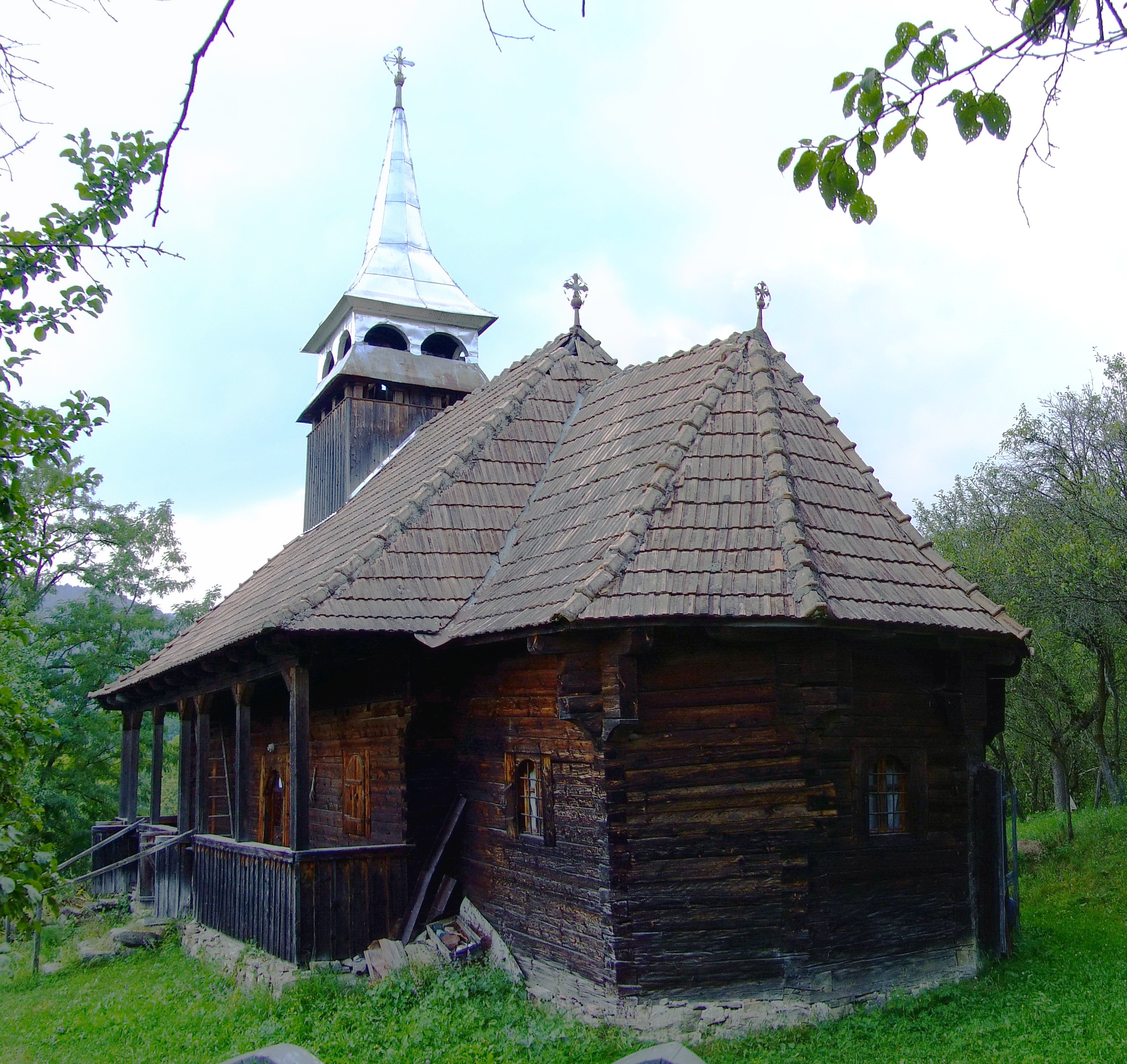 Biserica de lemn din Ocolişell (Biserici de lemn din Cluj)